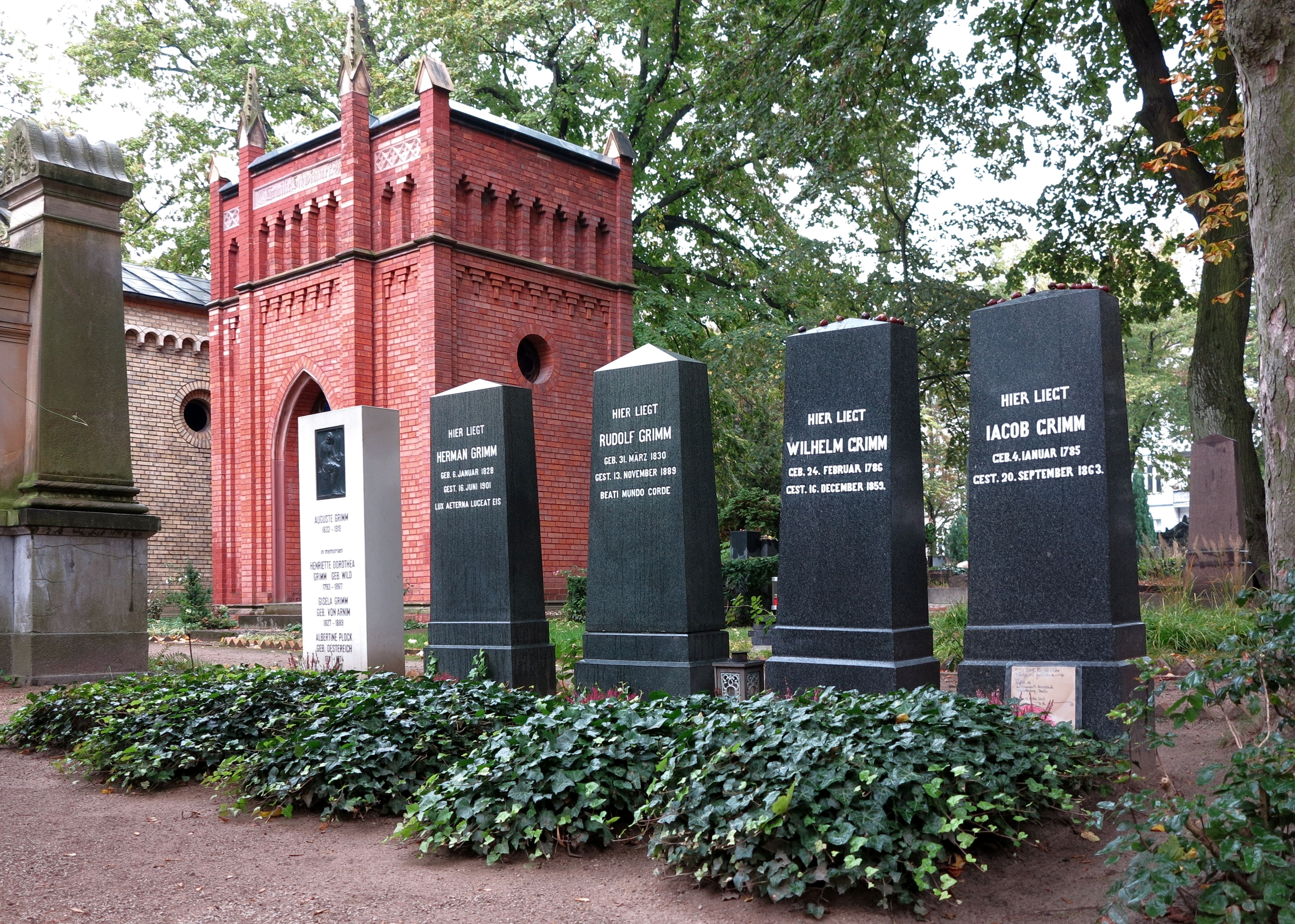 Die Gräber von Jacob und Wilhelm Grimm sowie ihrer Geschwister Rudolf, Herman und Auguste Grimm auf dem Alten Matthäus-Friedhof in Berlin